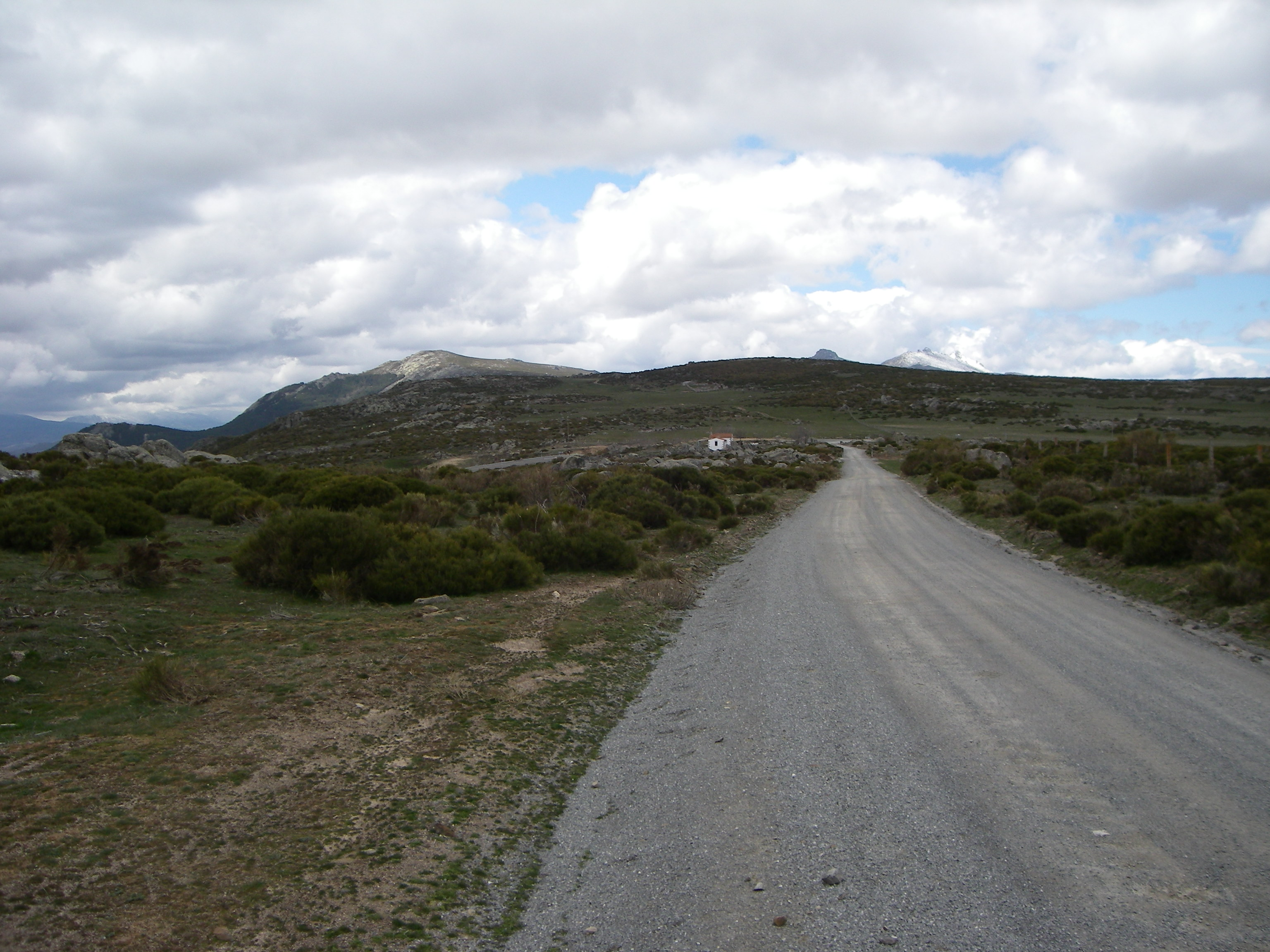 Las primeras piedras de la izquierda el Alto de la Paramera (1.523 m ) , Al fondo a la izquierda , Peña la Graja y al fondo centrado El Pico del Zapatero y el Portacho de Zapatero nevado. This is a photography of a Site of Community Importance in Spain with the ID: ES4110034. Natura2000 entry, EEA entry